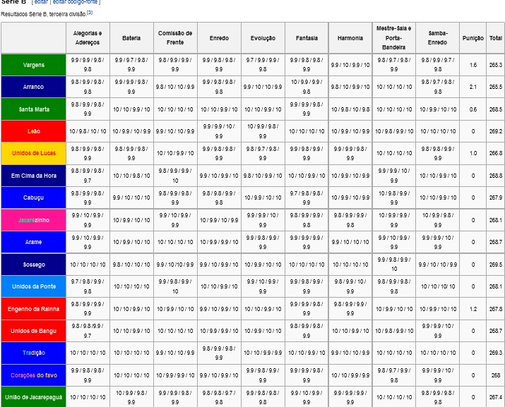 Resultados do Carnaval do Rio - 2016 - Grupo B